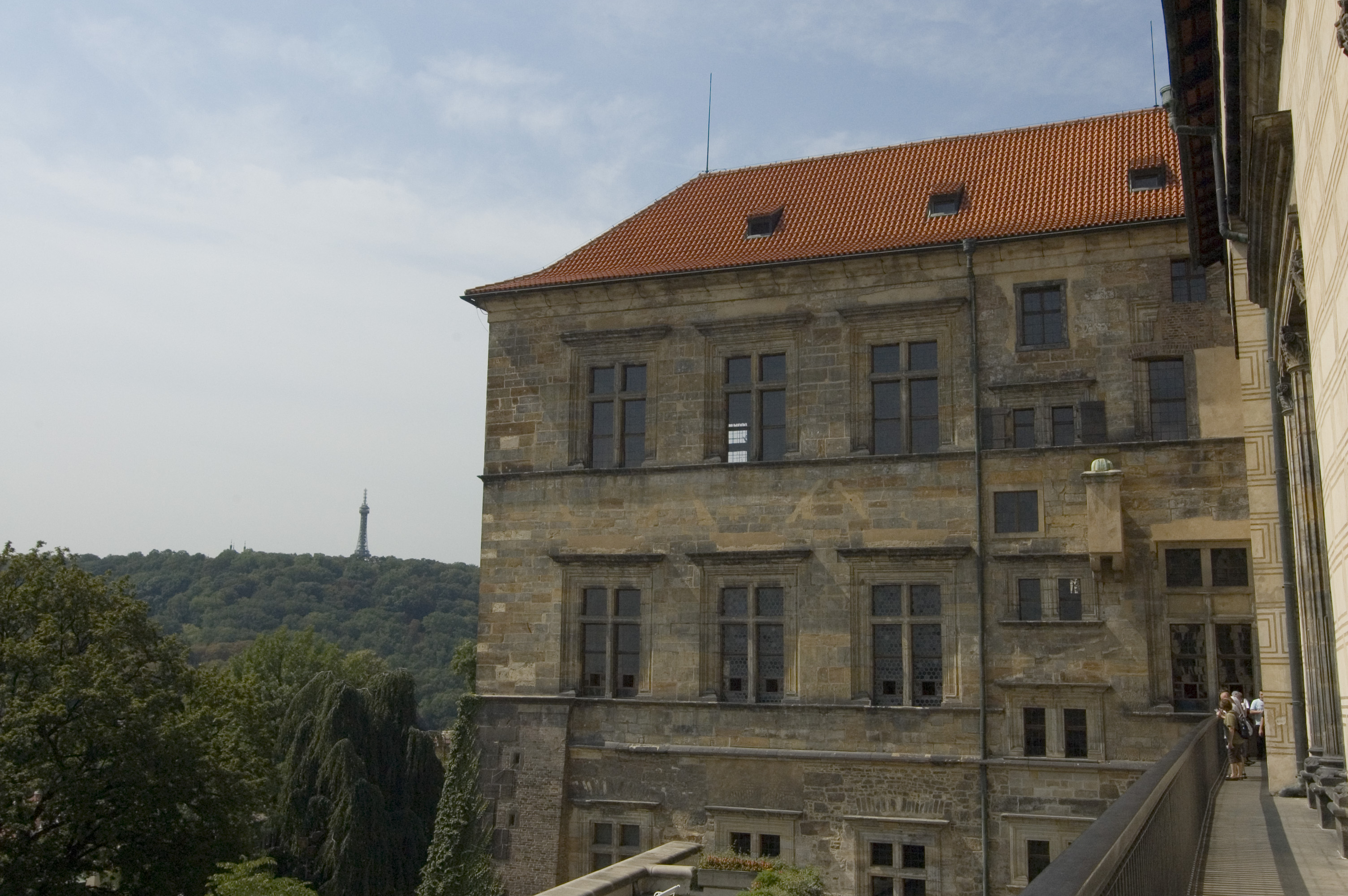 Pražský hrad, Starý královský palác, Ludvíkovo křídlo